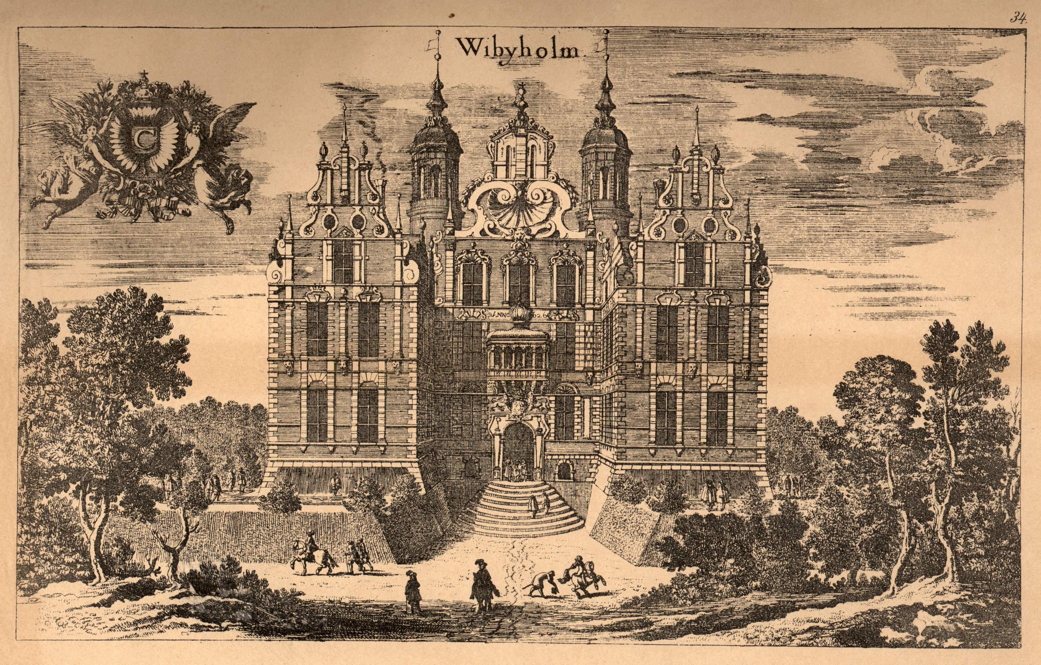 Wibyholm. Marot, Jean, ca 1619-1679 (Gravör) Dahlbergh, Erik, 1625-1703 (Kommissarie)